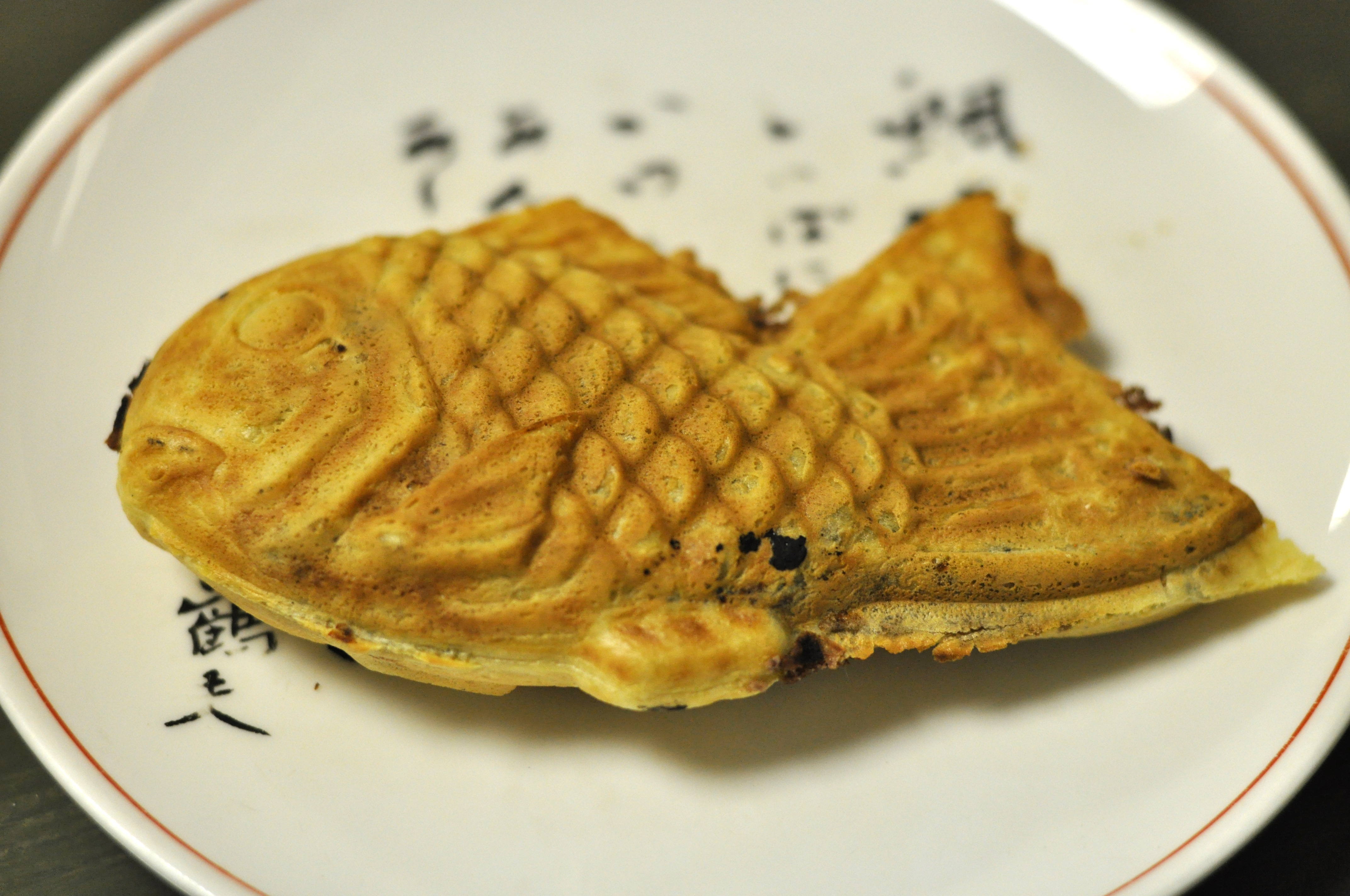 新宿区四ツ谷にある、たいやきわかばの所謂天然もののたい焼き